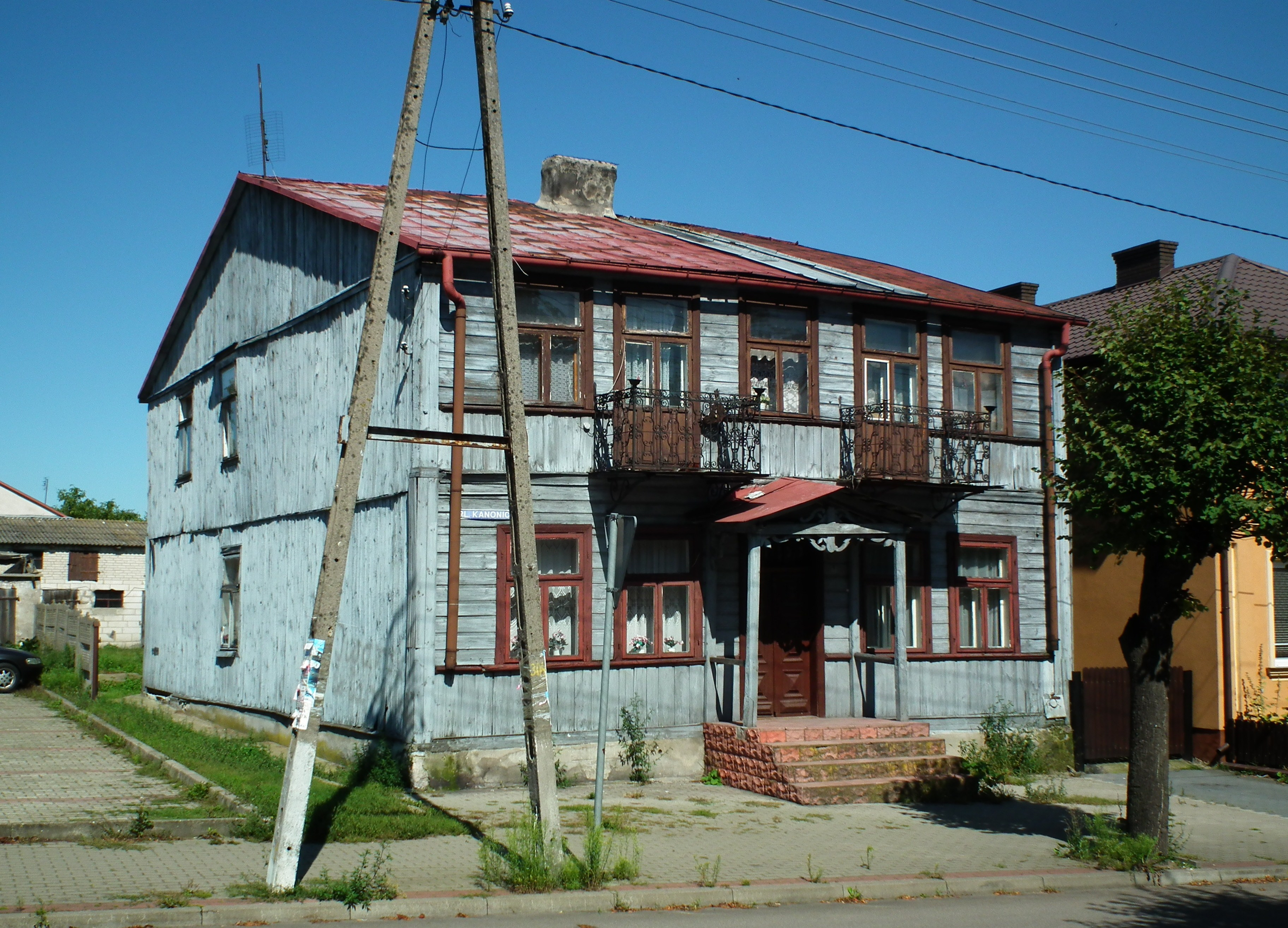 Pejzaż miejski z centrum Szreńska.